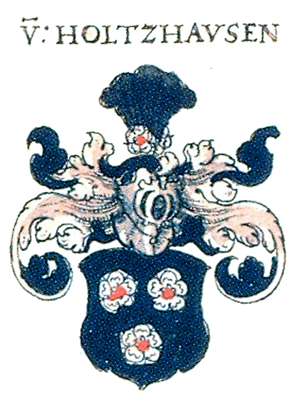 Wappen der Frankfurter Patrizierfamilie Holzhausen